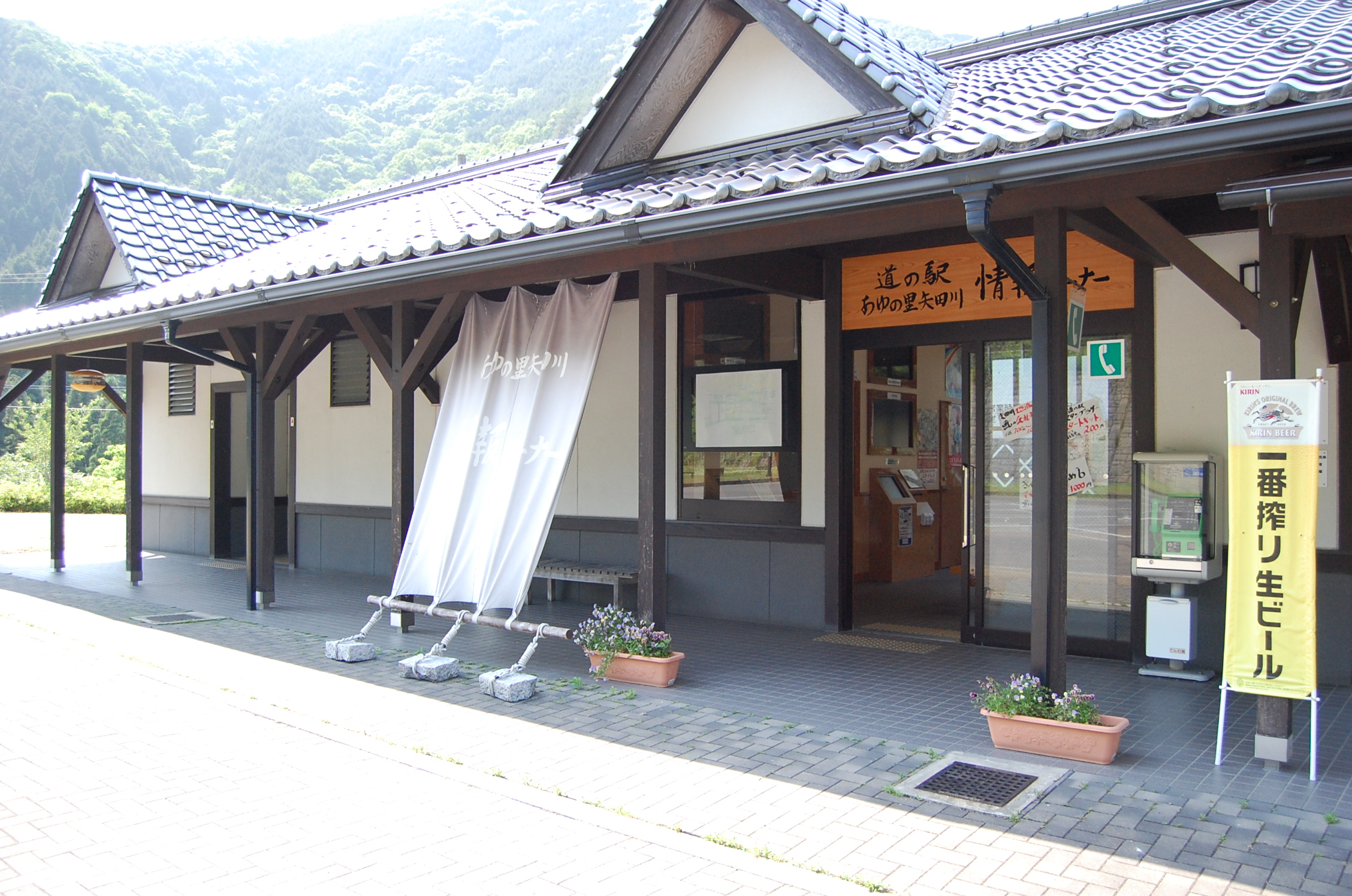 道の駅あゆの里矢田川の情報コーナーとトイレ